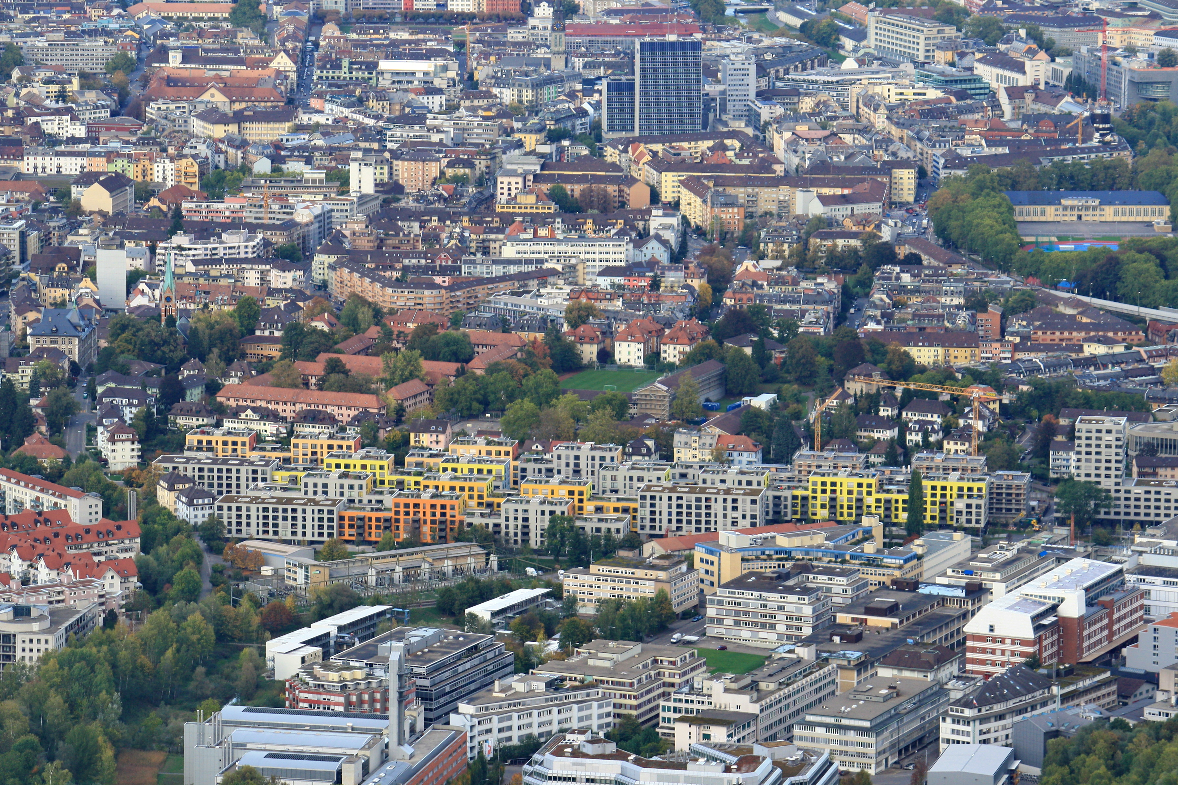 Zürich-Friesenberg and Werd quarters (in the background) as seen from Uetliberg Aussichtsturm